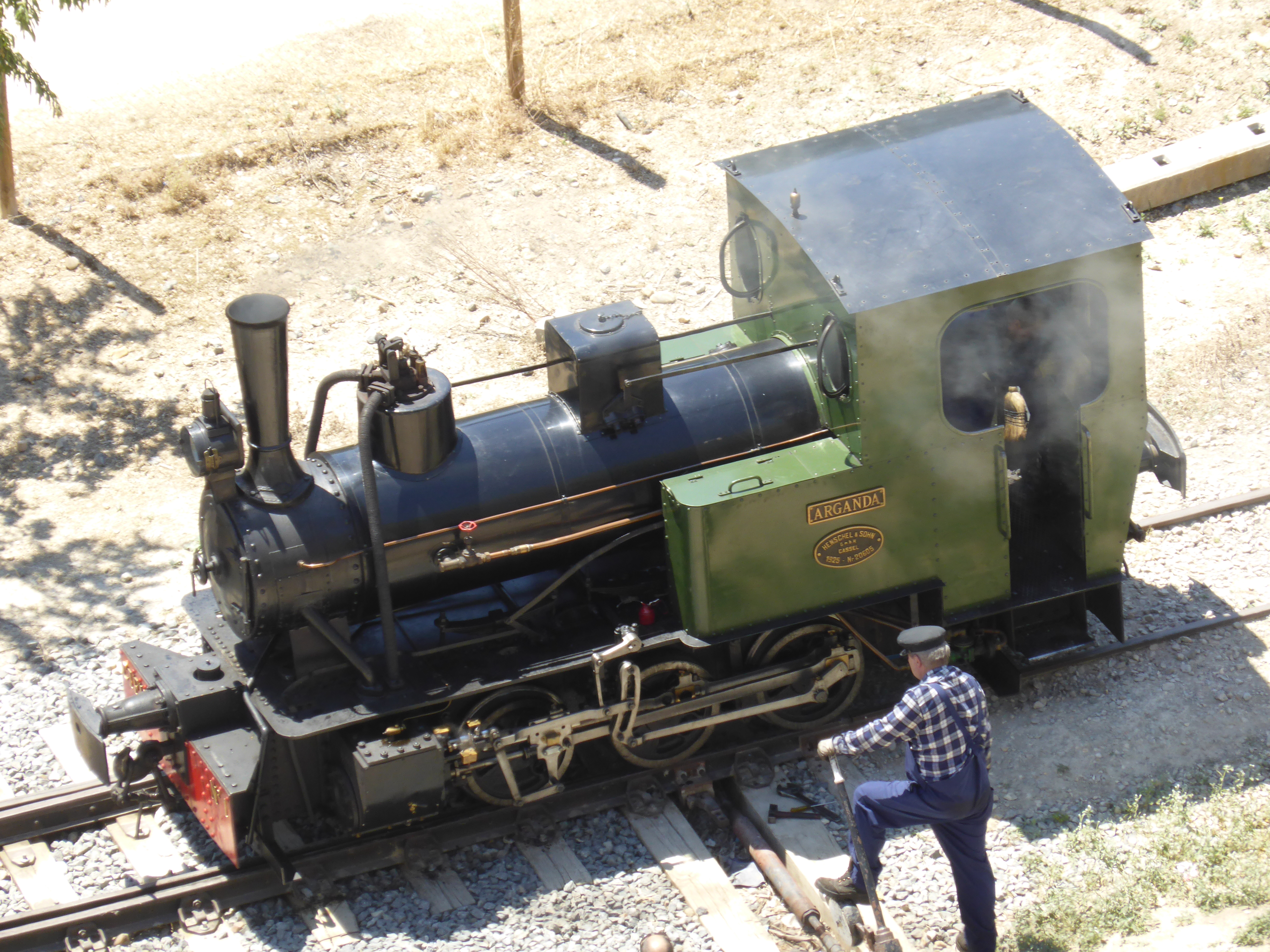 La locomotora de vapor "ARGANDA" circula en el ferrocarril histórico y turístico llamado "Tren de Arganda". Esta máquina fue construida en el año 1925 por la casa alemana "Henschel und Sohn", en Kassel. Es de vía métrica (vía estrecha de un metro). El tren pertenece a la asociación CIFVM (Vapor-Madrid), que tiene su sede en la antigua estación de La Poveda, del municipio de Arganda del Rey (Madrid, España). La línea ferroviaria llega hasta el apeadero de la laguna del Campillo, de Rivas-Vaciamadrid, donde está fotografiada la locomotora, desde lo alto de un cortado o cantil yesífero.